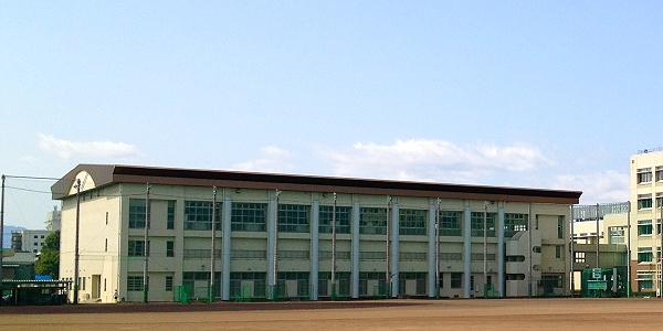 沼津市立沼津高等学校体育館北面および東面を、グラウンド北東端から望遠で見たもの。被写体手前に防球ネットと支柱がある。平成24年3月20日撮影。